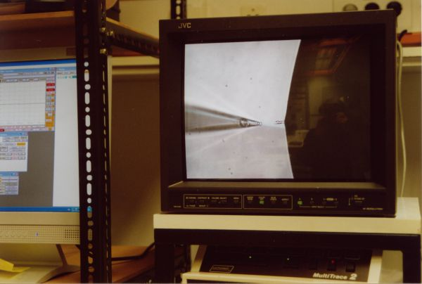 Patch-clamp установка 3установка для patch-clamp ооцитов, outside-out mode